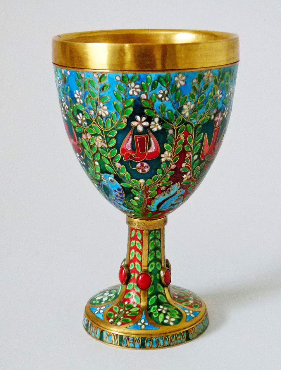 Margarete Seeler: Family Cup. („Familienbecher“) (Silber-Cloisonné auf Kupfer), Höhe 16 cm/Durchmesser 9,5 cm, Entstehungsjahr: ca. 1974, Privatbesitz.